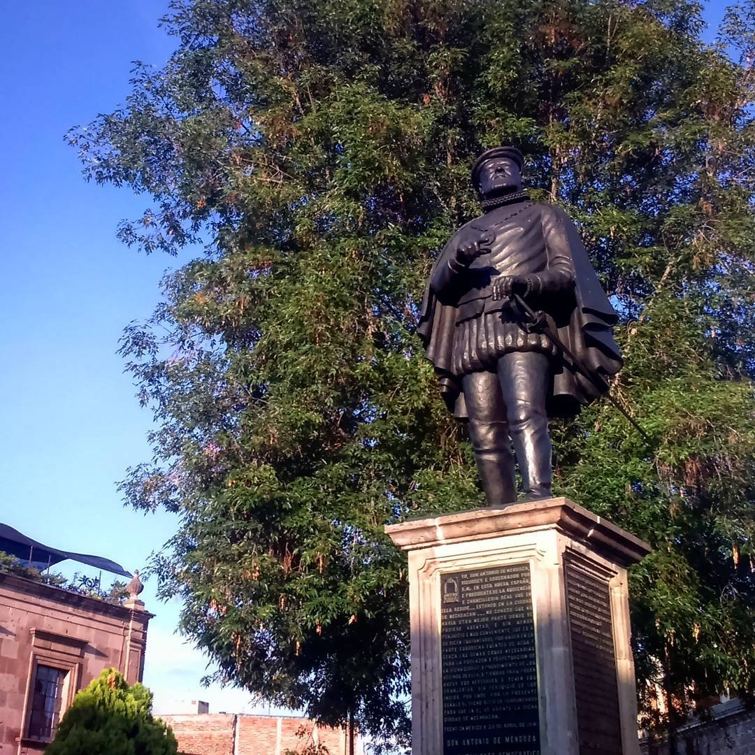 ESTATUA VIRREY DE MENDOZA MORELIA